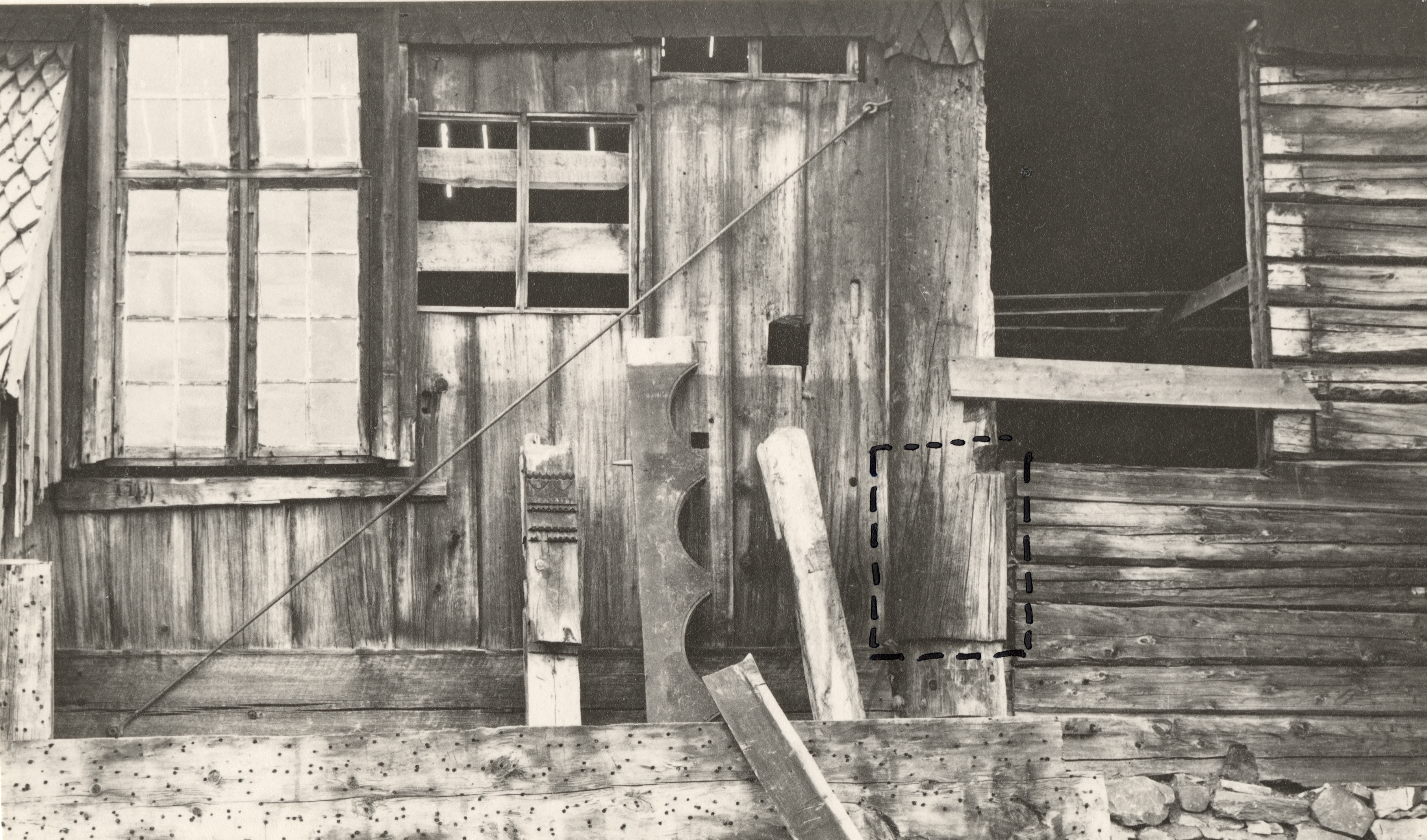 Eidsborg stavkirke i Eidsborg, Telemark Sydvegg, markert parti viser runefeltet.